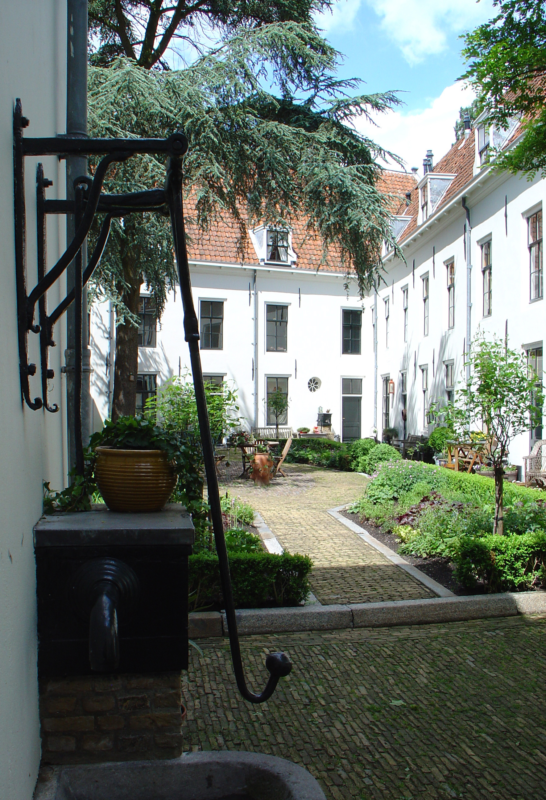 Binnenplaats Willem Vroesenhuis te Gouda gemaakt op nl:24 mei nl:2006 (datum- en tijdinstelling op camera was niet juist)